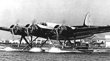 CANT Z.509 Licensing Categoria:Immagini di aeroplani